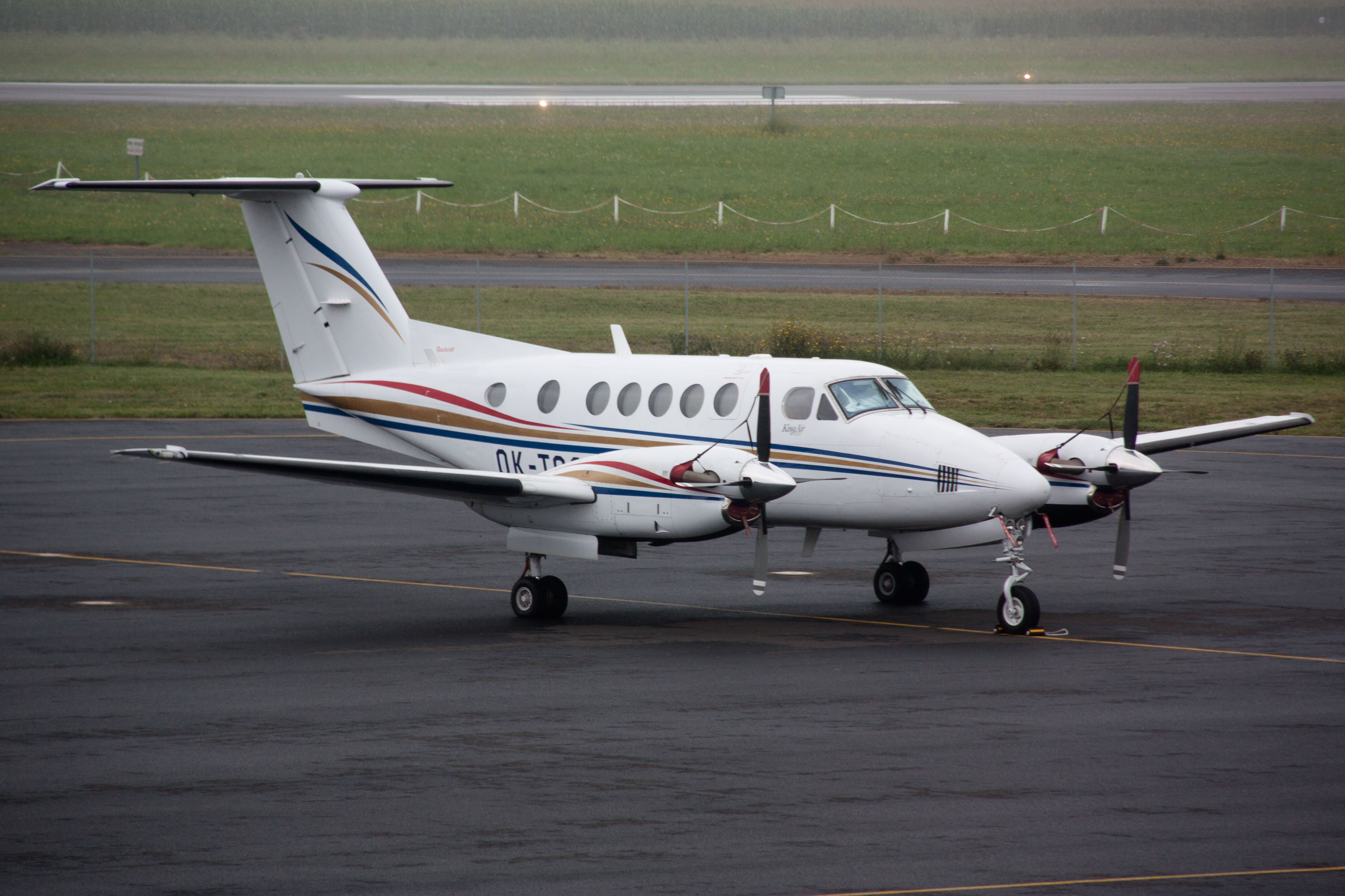 Beechcraft King Air B200, stationné à l'aéroport de Tarbes-Lourdes-Pyrénées, France.